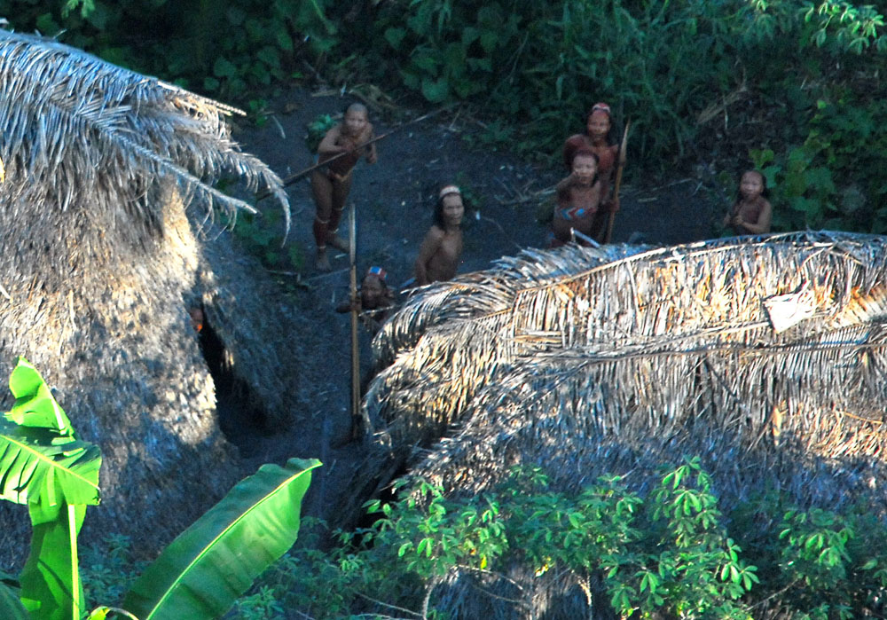 Índios isolados em aldeia localizada no estado brasileiro do Acre.